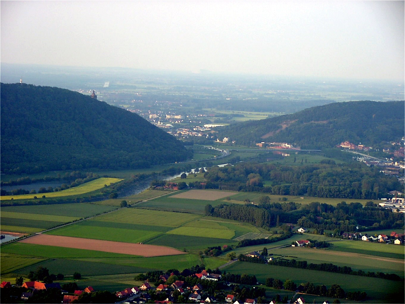 Die Porta Westfalica (Blick von Süd nach Nord) Sonstiges: ...